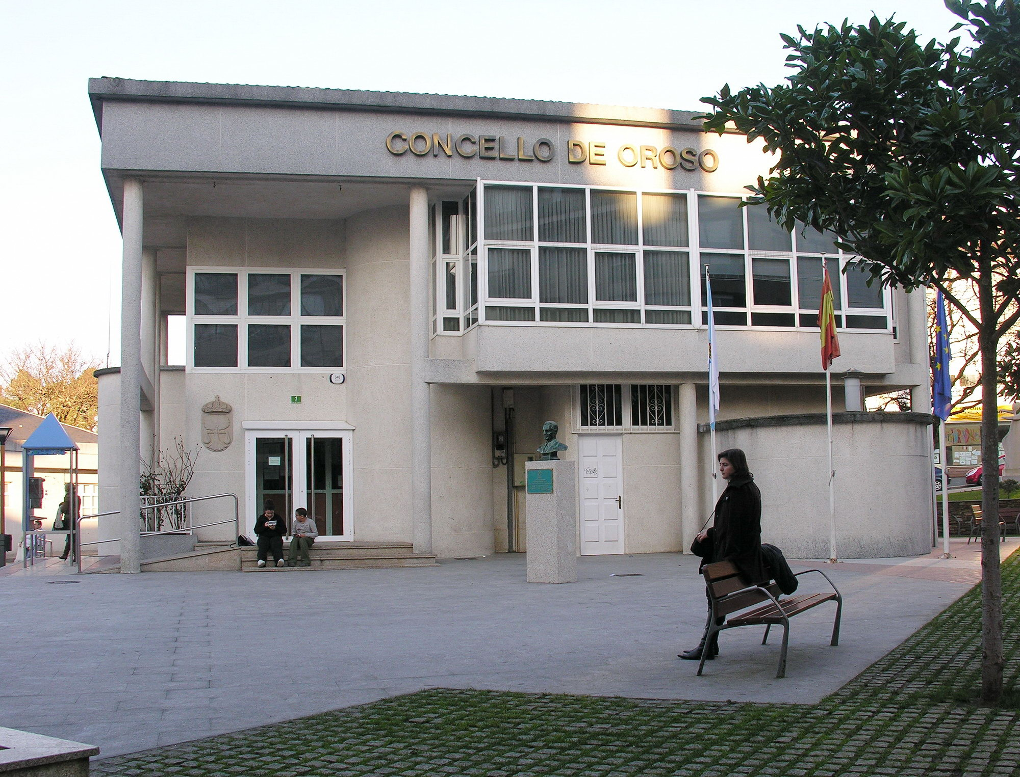 Casa do concello de Oroso en Sigüeiro, Galiza.